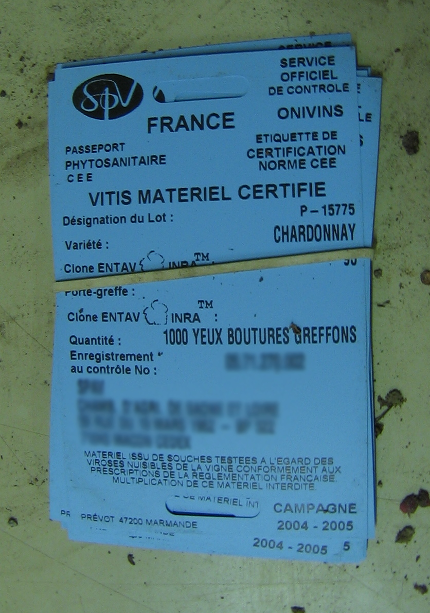 Etiquettes de greffons